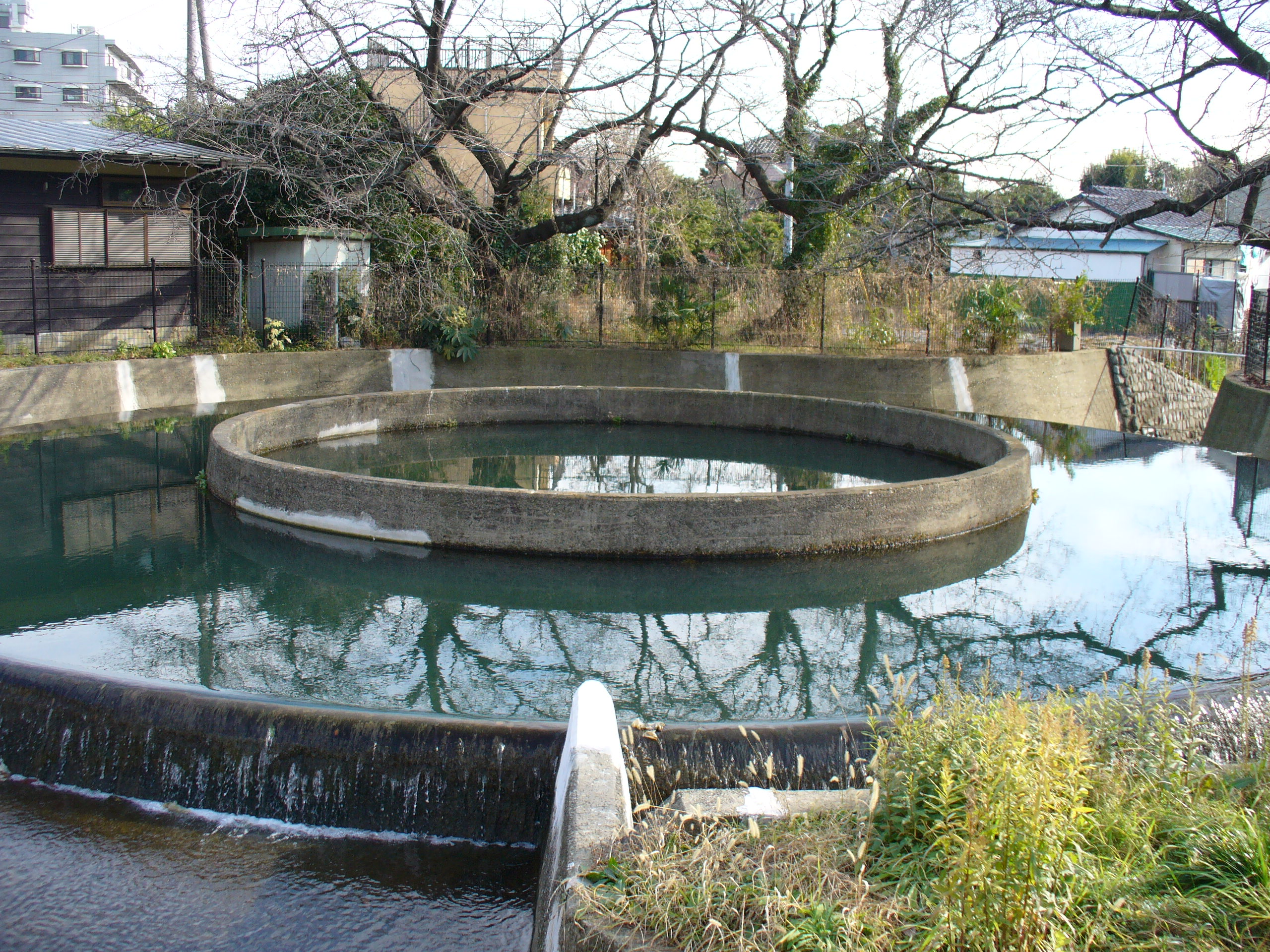 二ヶ領用水久地円筒分水